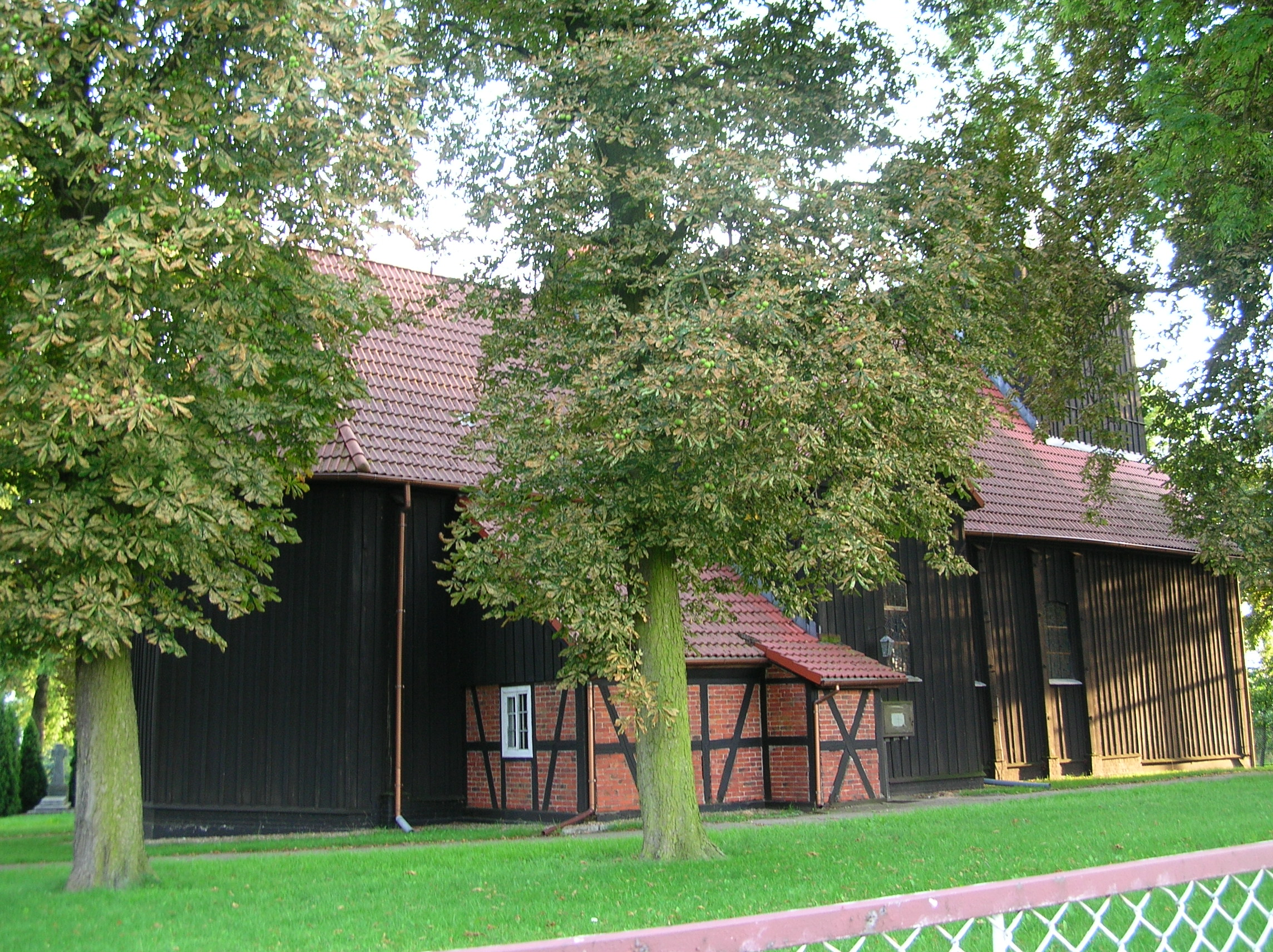 Saint Anne church at Liszkowo